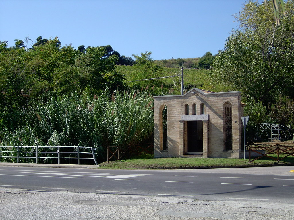 Massignano (Ascoli Piceno): mausoleo ai martiri della strage nazista